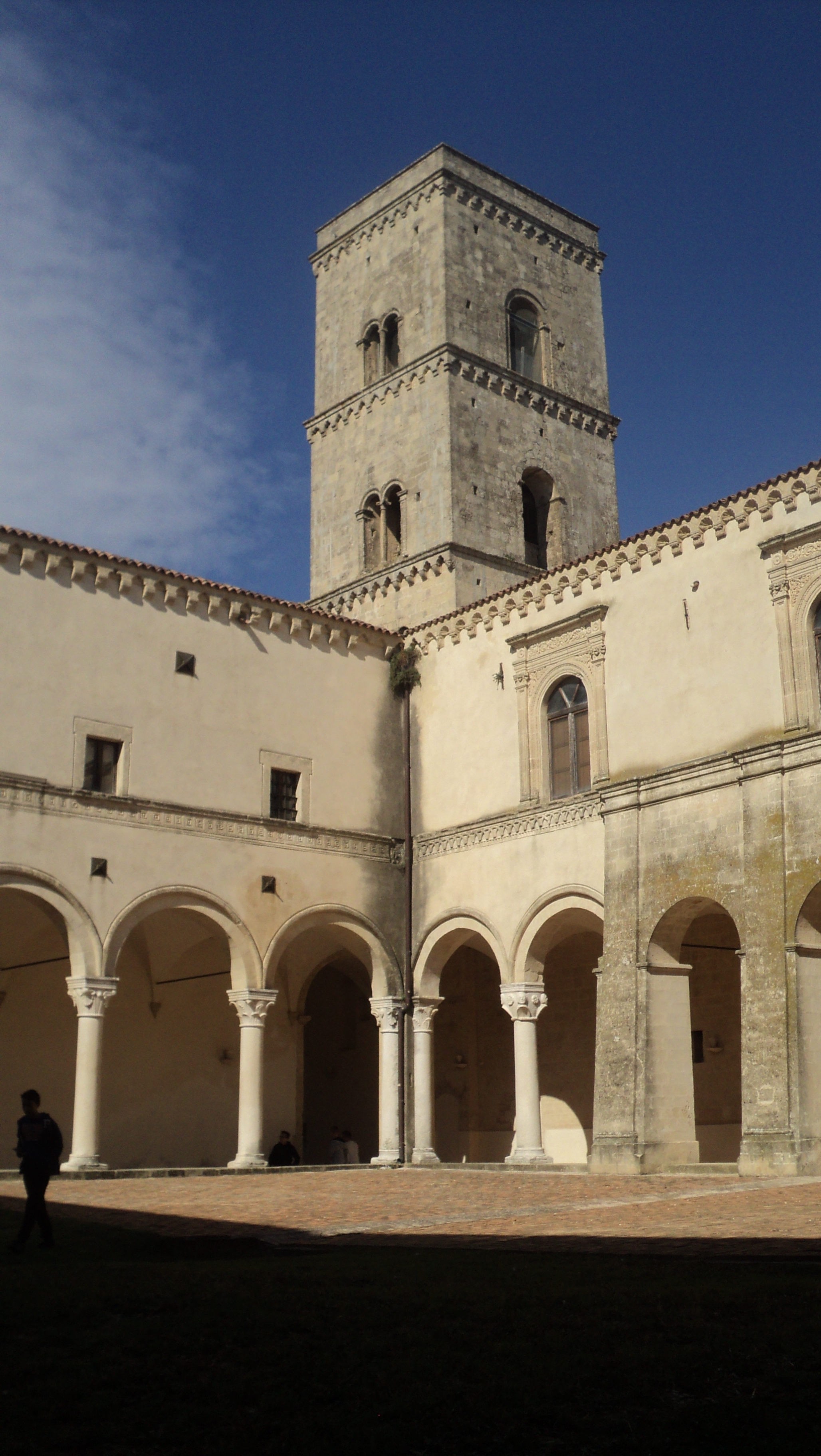 abbazia benedettina di San Michele Arcangelo This is a photo of a monument which is part of cultural heritage of Italy.